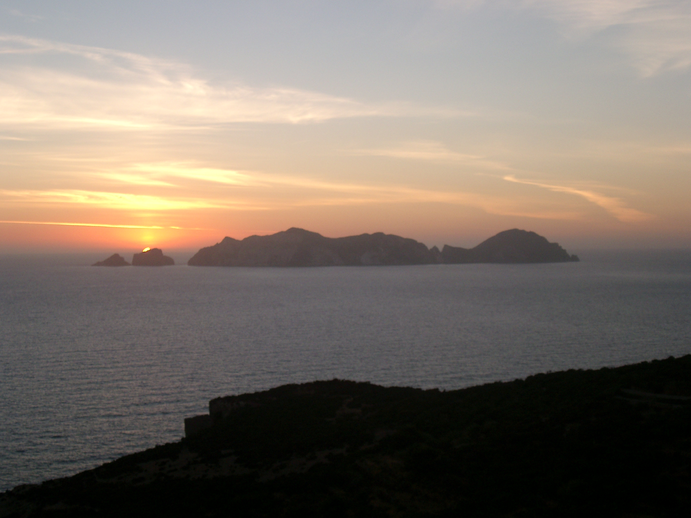 veduta di Palmarola da Ponza al tramonto